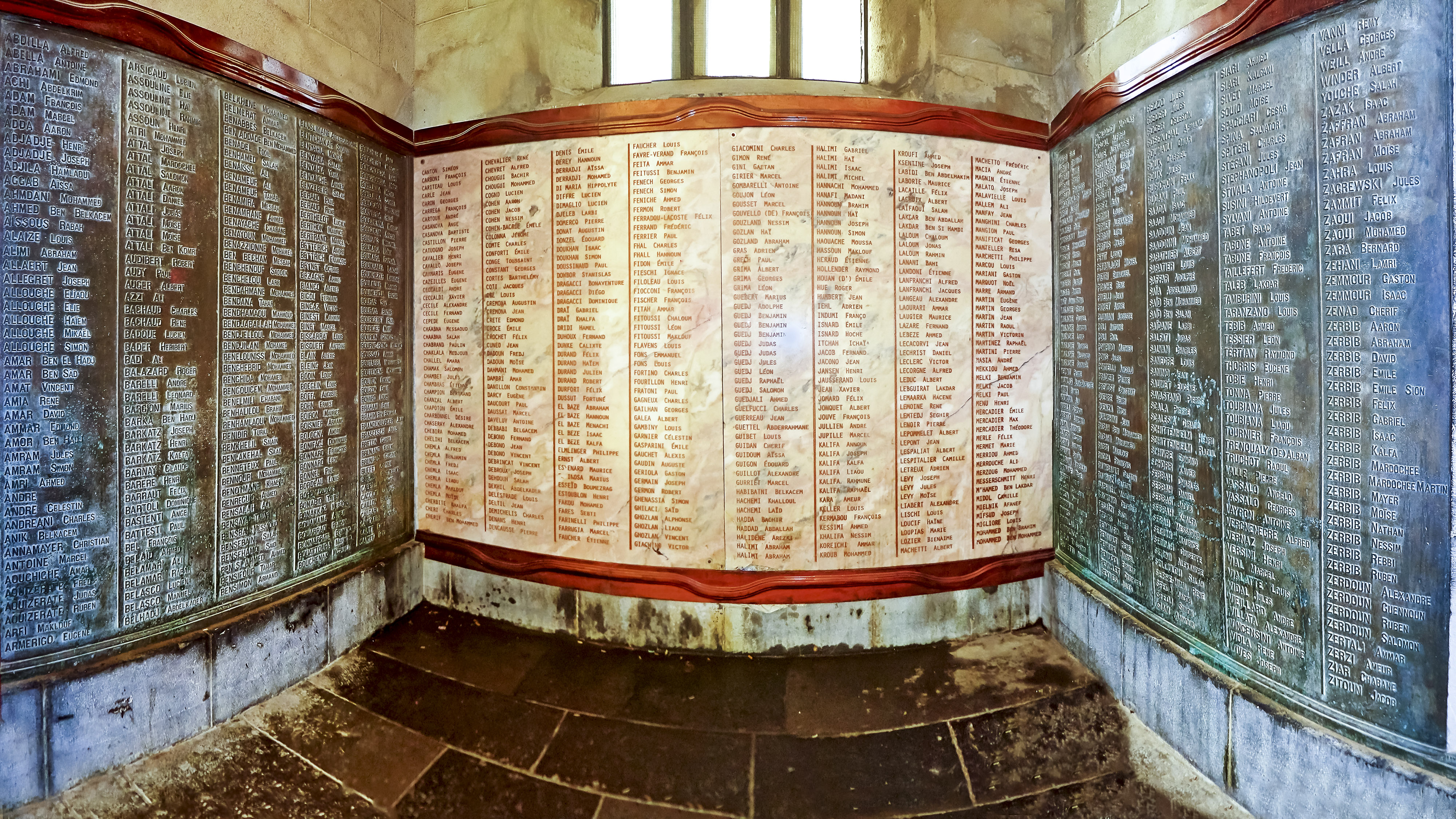 Monument aux morts - Constantine معلم تذكاري - قسنطينة Wilaya de Constantine ولاية قسنطينة